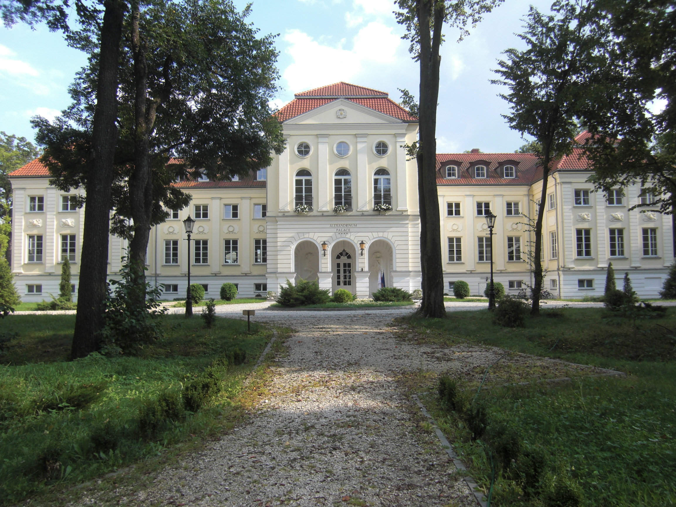 Hotel Pałac Alexandrinum